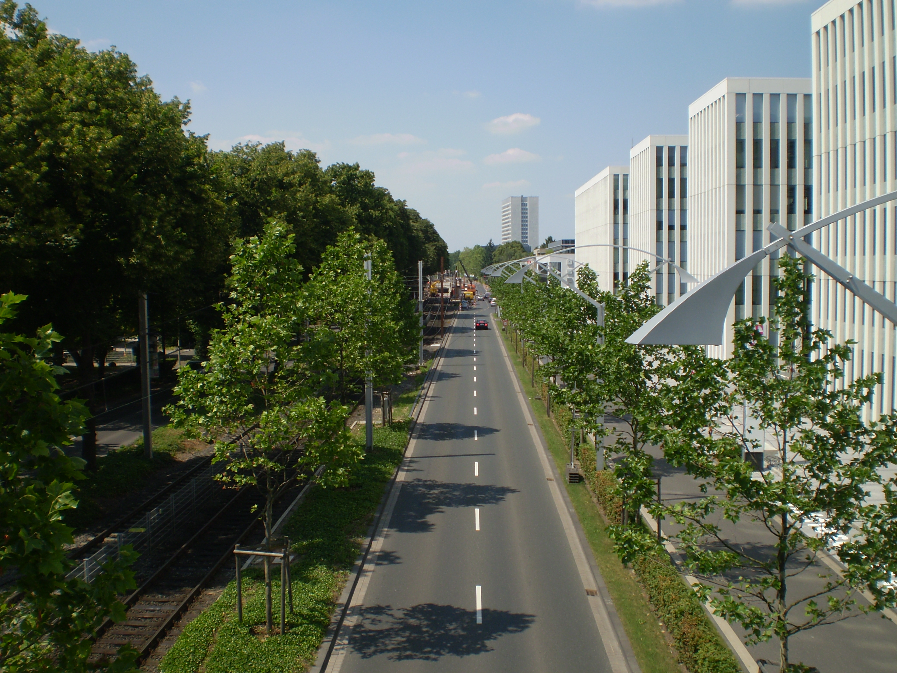 Friedrich-Ebert-Allee (Teil der sogenannten „Bundesallee“) und Stadtbahngleise auf der Höhe des Office Ports, Blick Richtung Norden, Bonn-Gronau